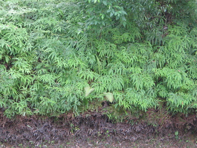 Pokok paku pakis 2005 @Mohamed Yosri